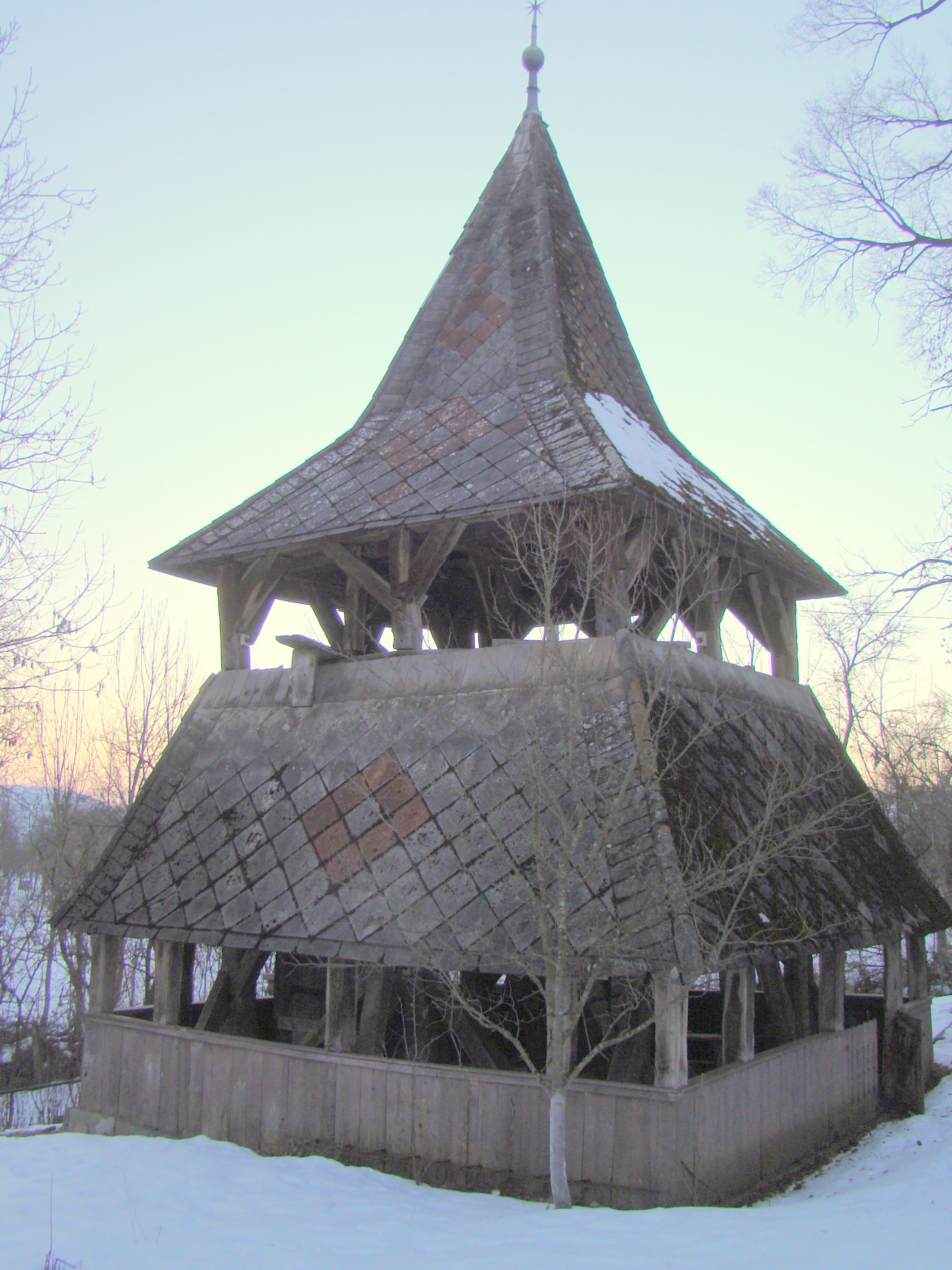 Turn-clopotniță din lemn, sat Filpișu Mare; comuna Breaza, judeţul Mureş 02